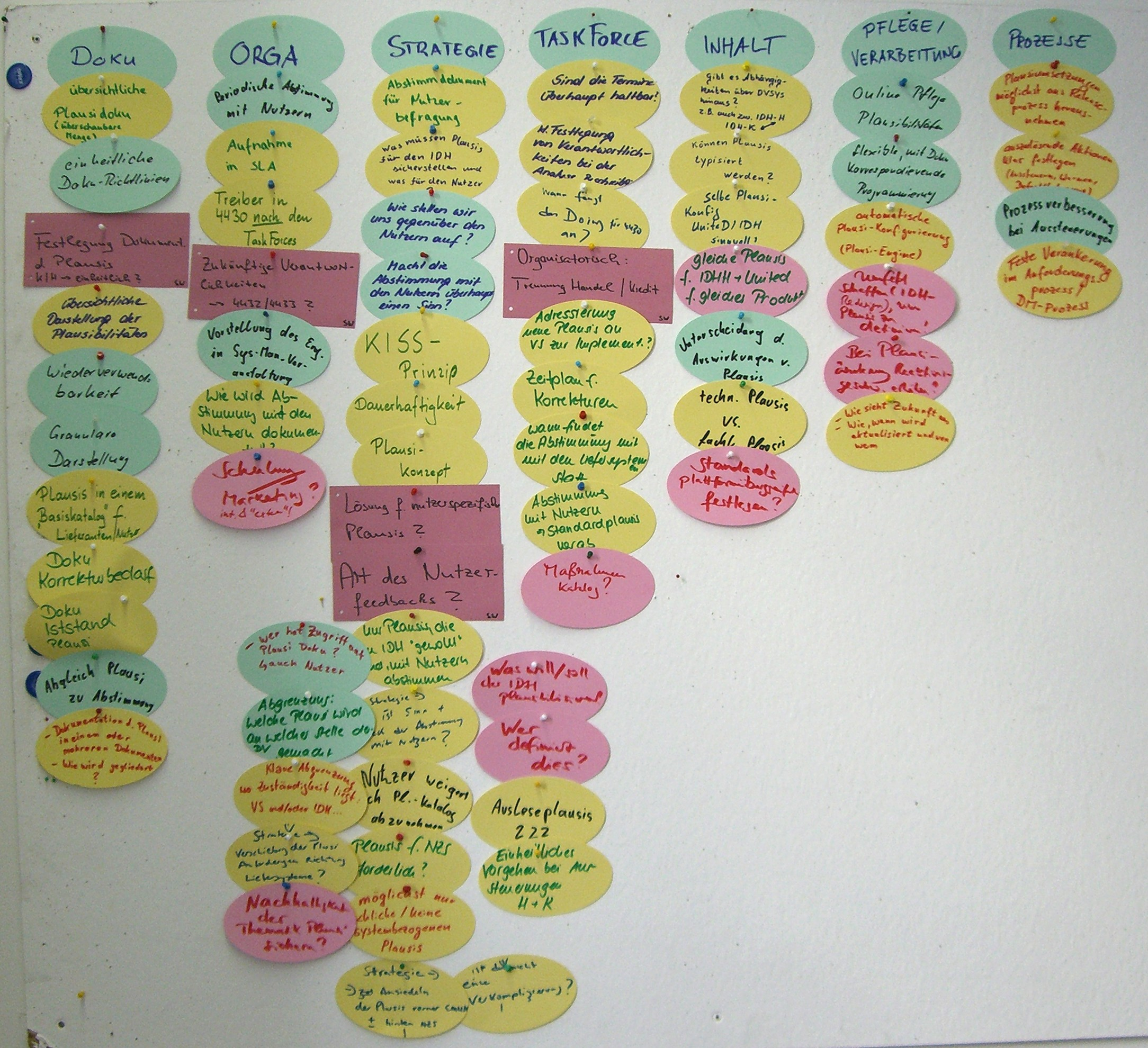 Für eine Moderation genutzte Pinnwand